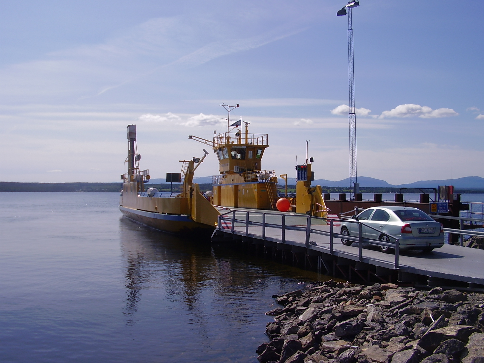 Bilfärjan Skidbladner som trafikerar Håkanstaleden i Storsjön, Jämtland.